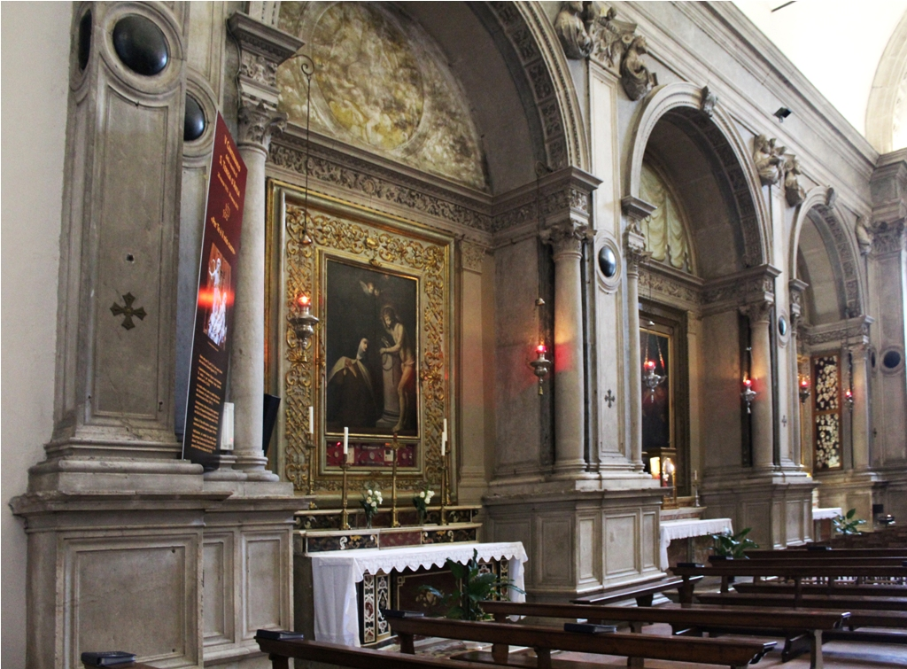 Cappelle laterali meridionali - Chiesa di S. Pietro in Oliveto - Brescia